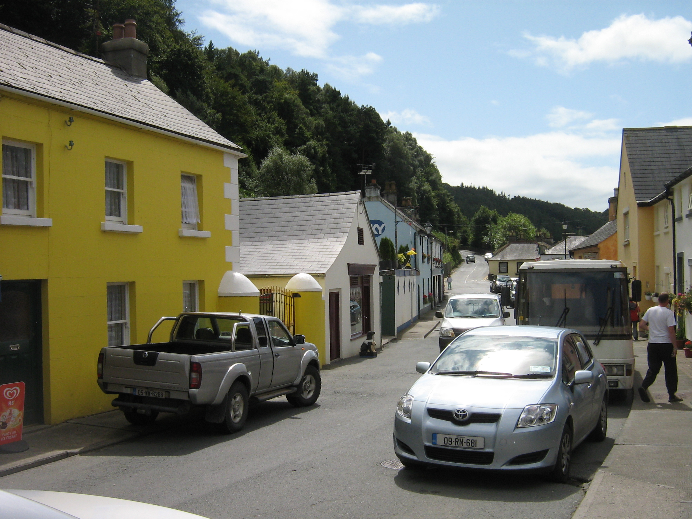 Hauptstraße in Avoca, County Wicklow